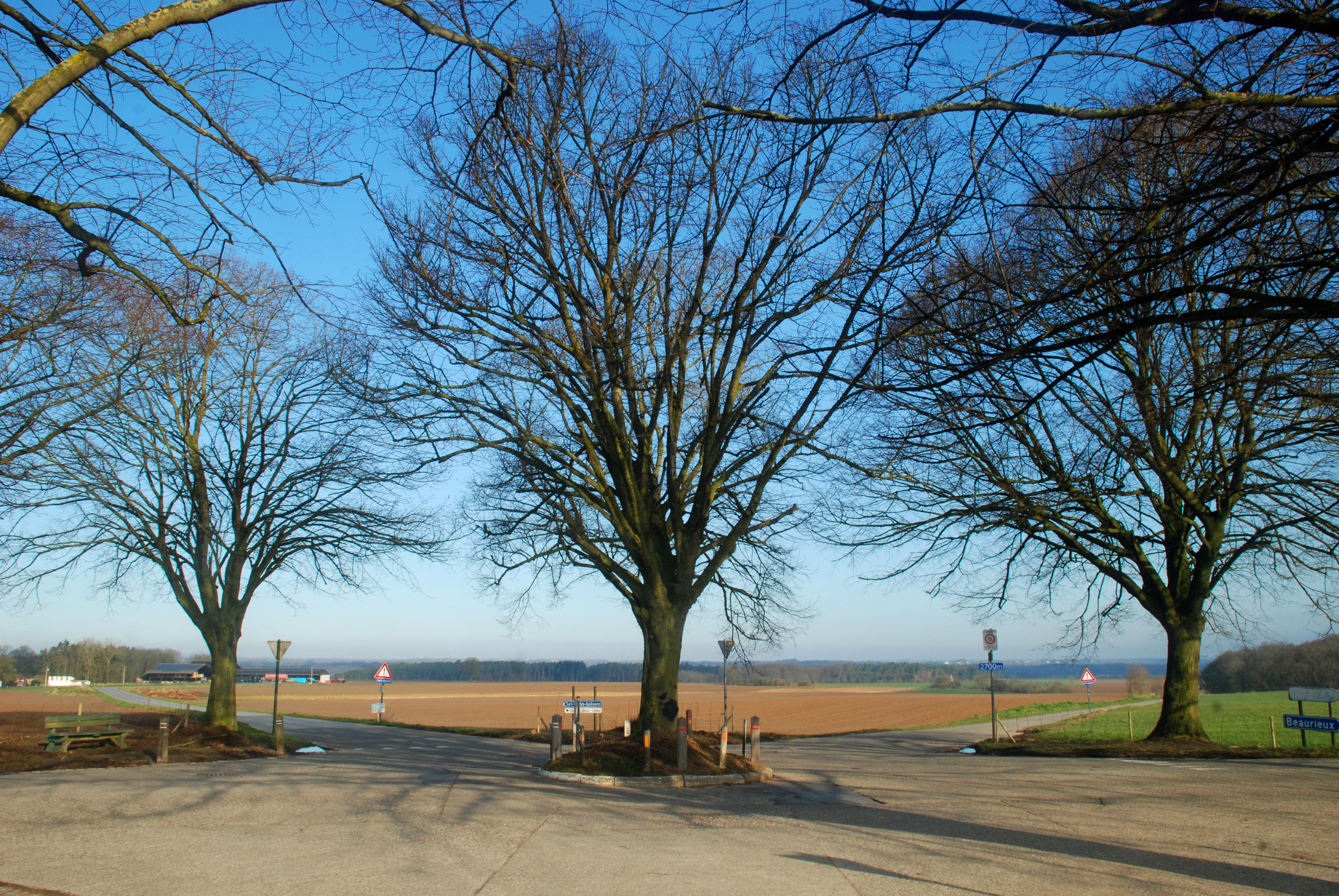 Belgique - Brabant wallon - Court-Saint-Étienne - Arbre de la justice